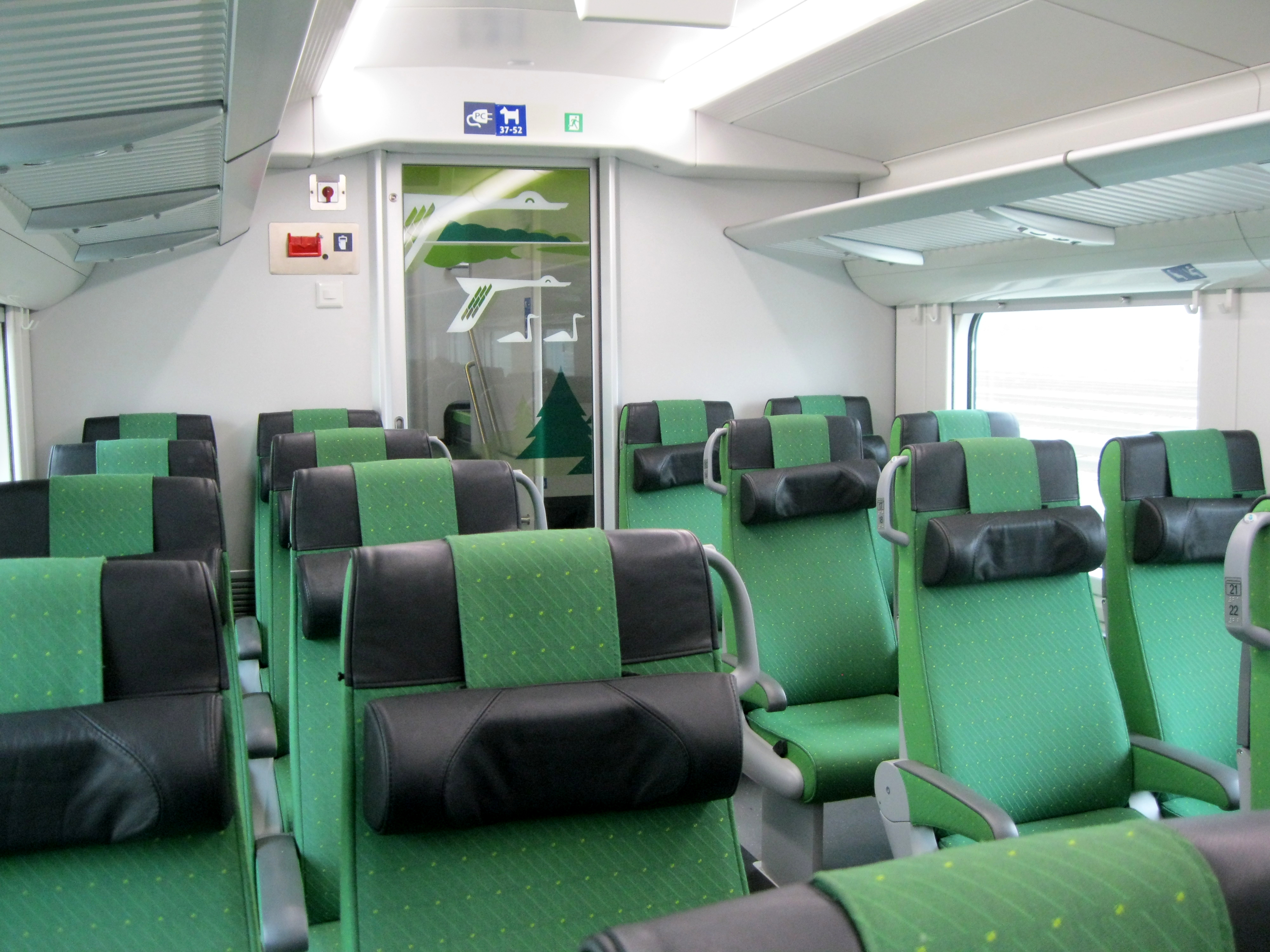 VR:n InterCity-juna sisältä.